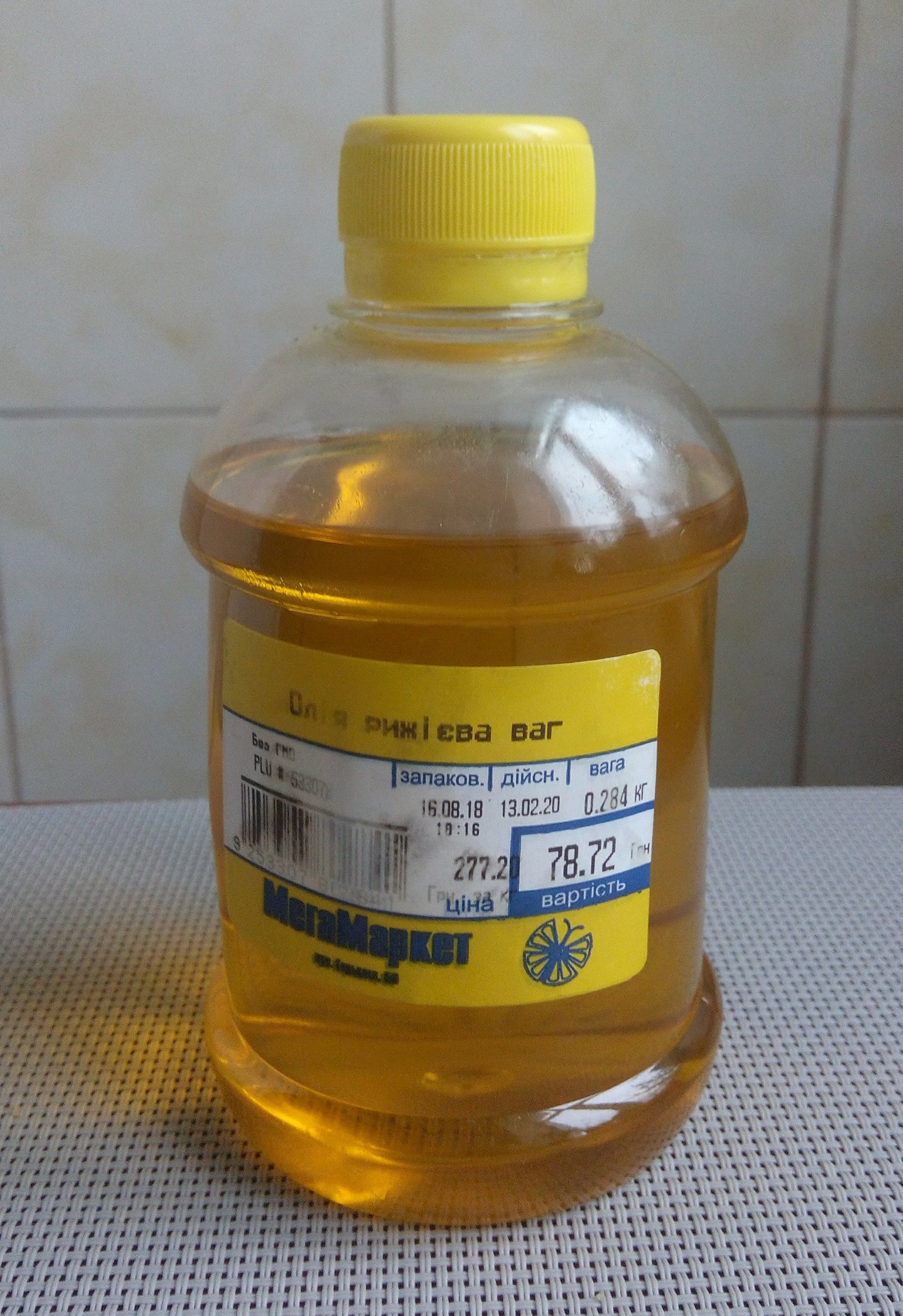 Рижієва олія